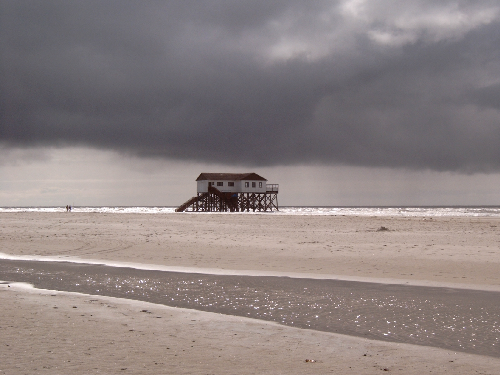 Stelzenbau am Strand fotografiert von RenDark erstellt: 2004